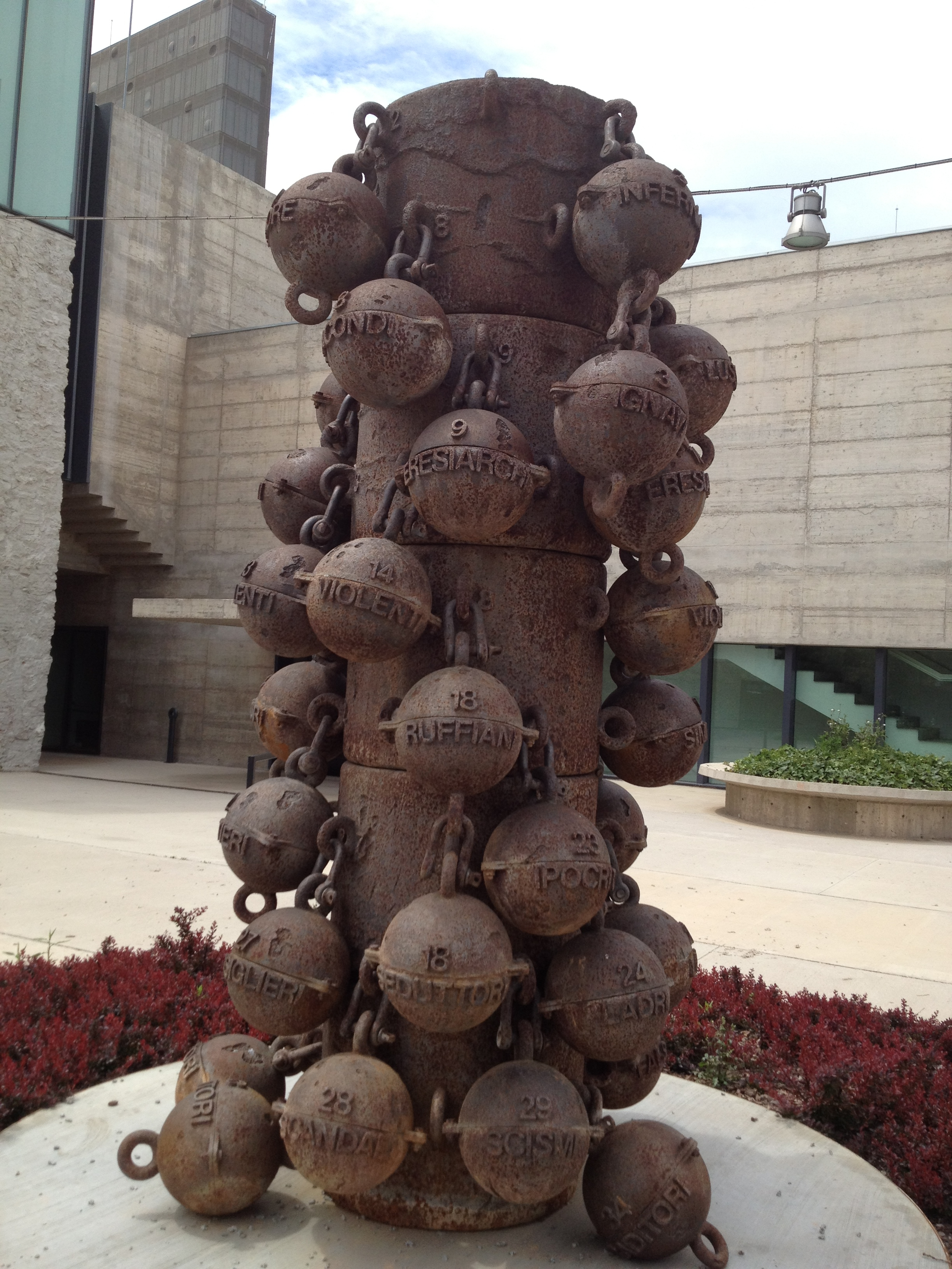 Dell'Arte (Jaume Plensa). C. Roc Boronat, 126-146 -Fundació Vila Casas- (Barcelona)